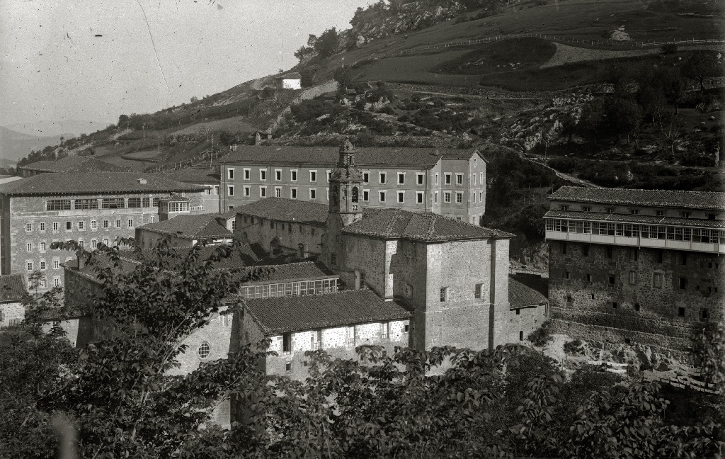 Título original: Vista del santuario de Nuestra Señora de Arantzazu en Oñati (1/2) Localización: Oñate (Guipúzcoa)